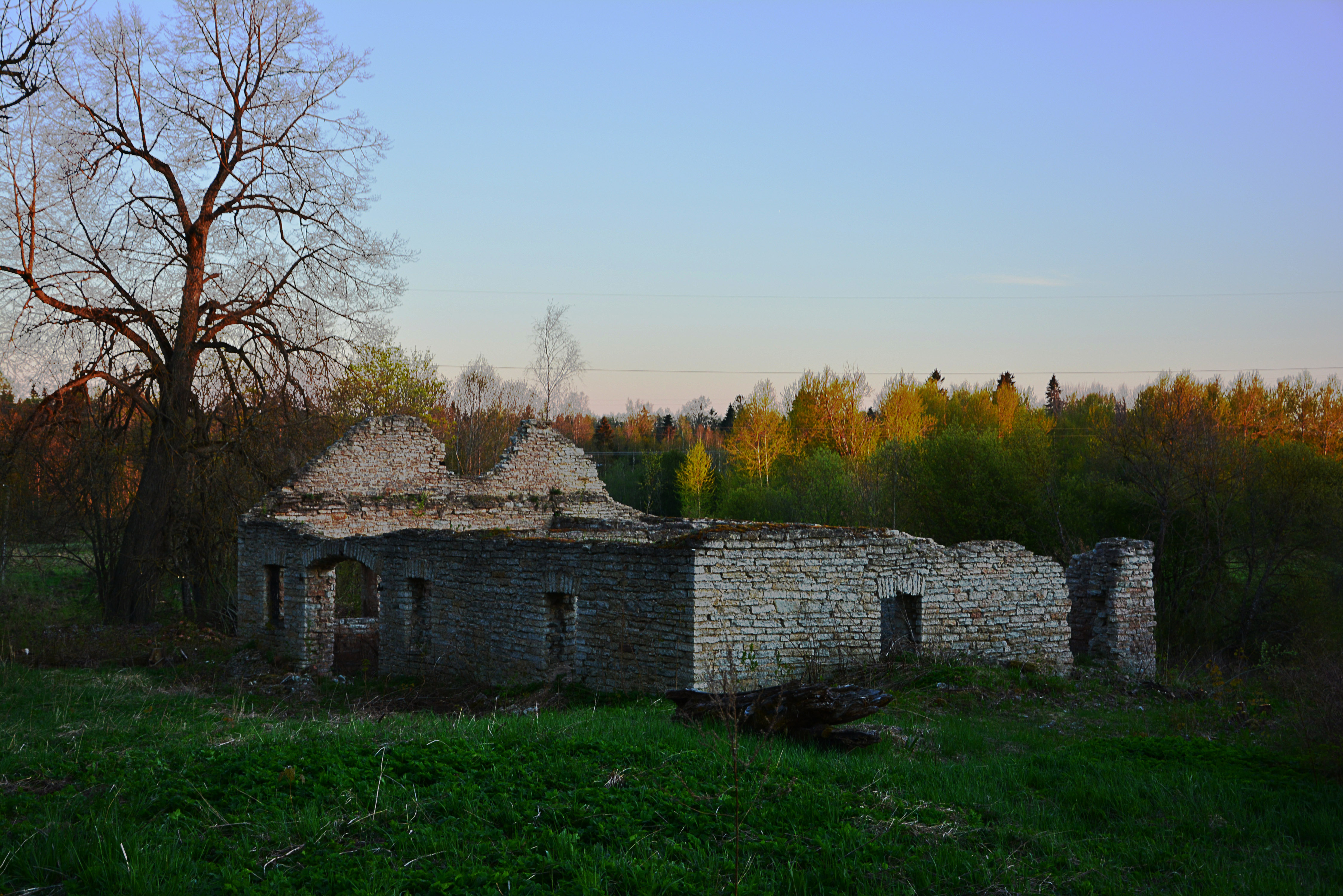 Püssi mõisa sepikoda, 19.saj.